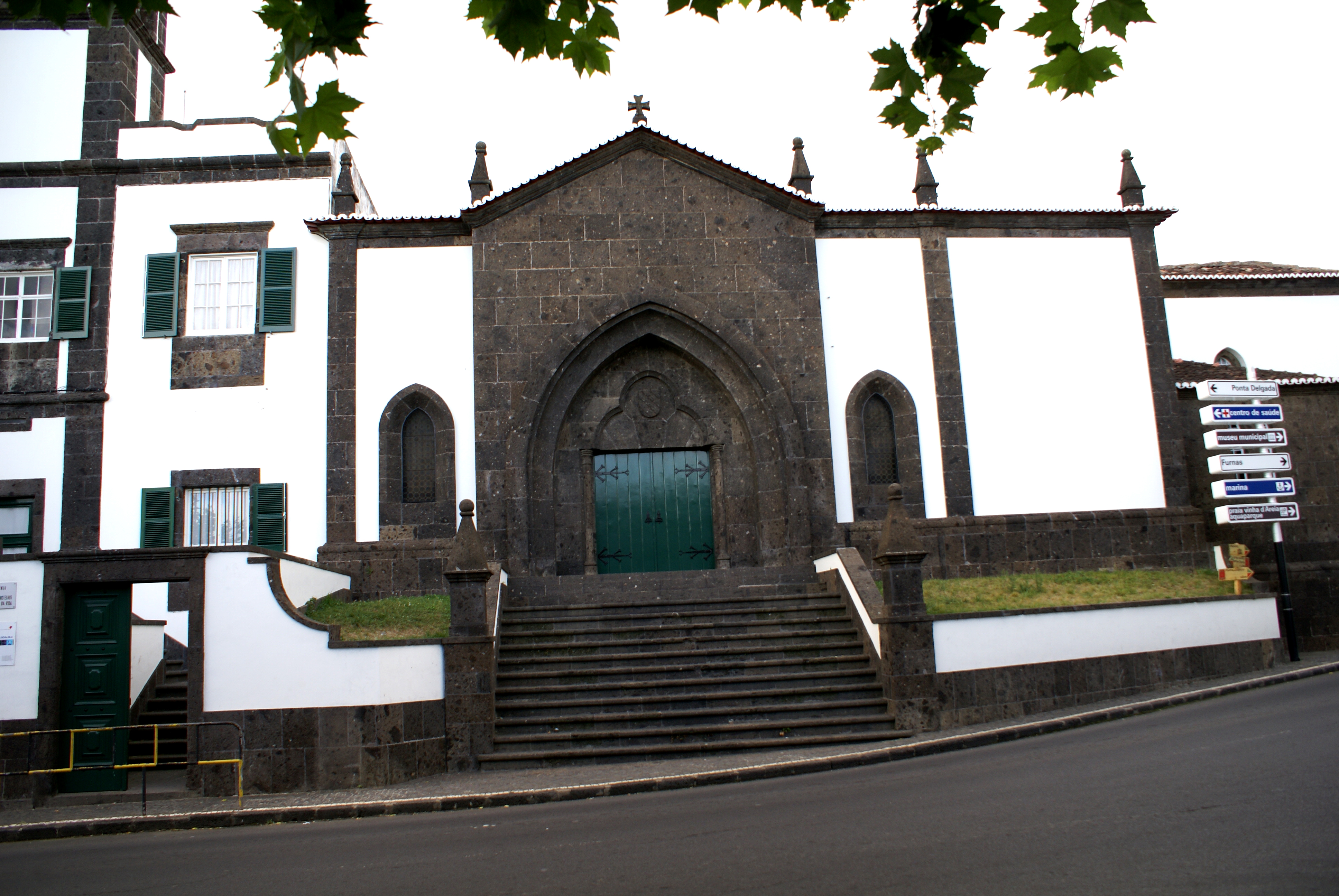 Convento de Santo Andrá, fachada, Vila Franca do Campo, ilha de São Miguel, Açores